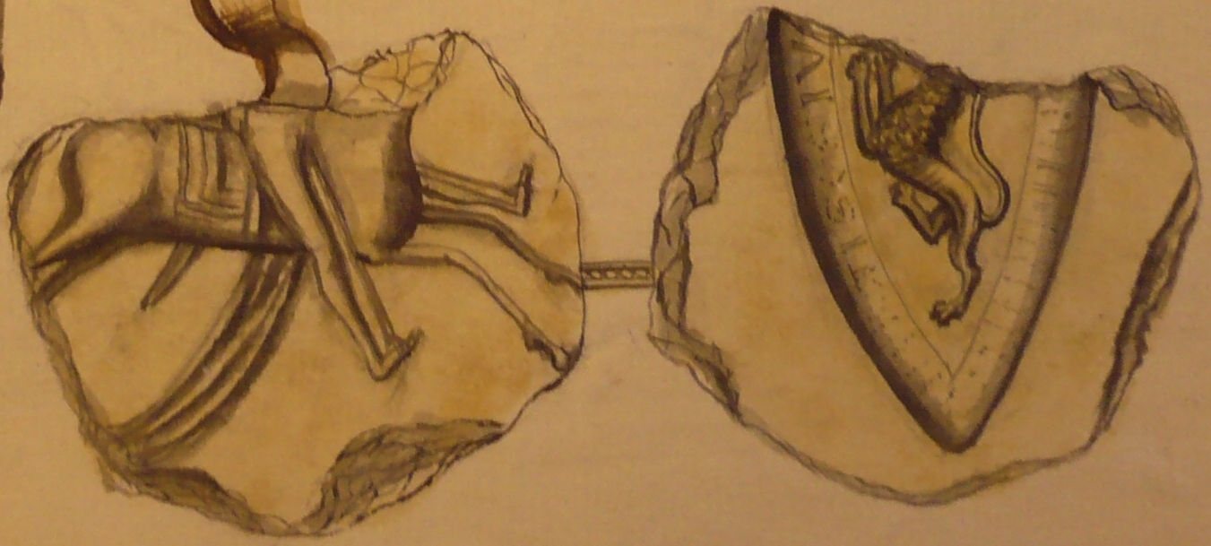 Framsiden av Skule Bårdsons segl fra 1225. Se teksten i DN I nr 8.